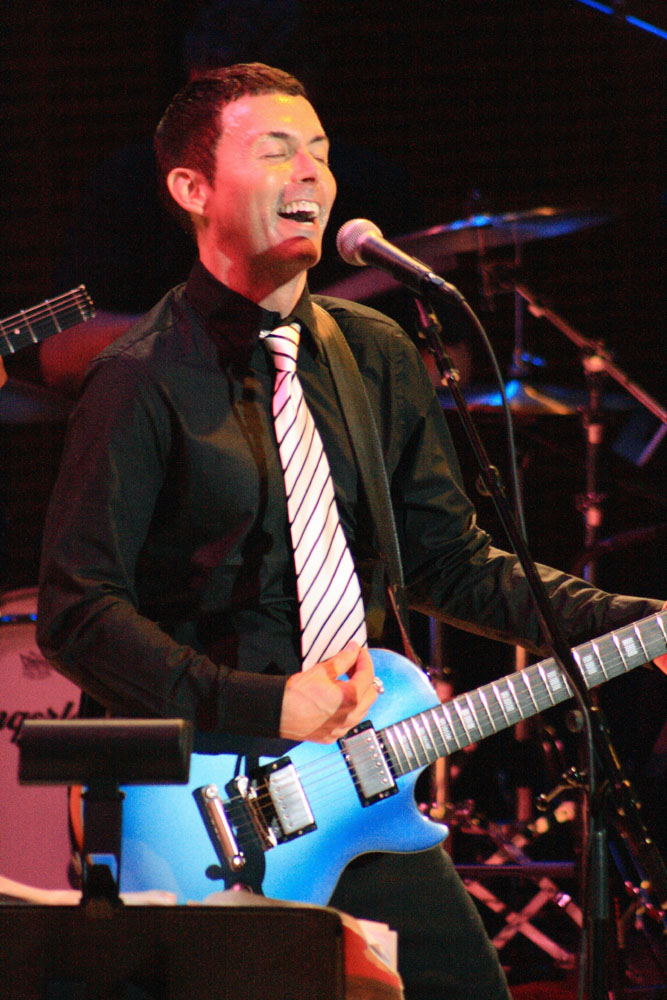 Richard Barone